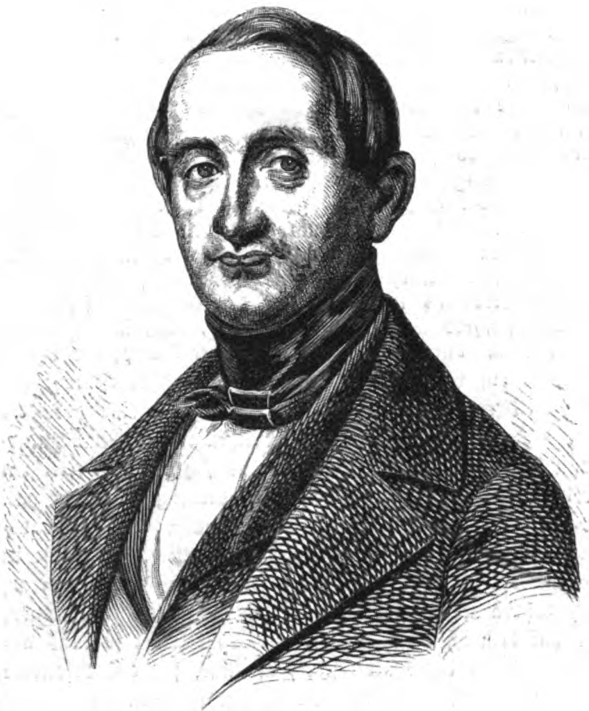 Alfred von Auerswald, preußischer Minister, 1847.